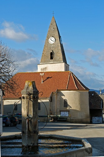 Eglise de Prébois